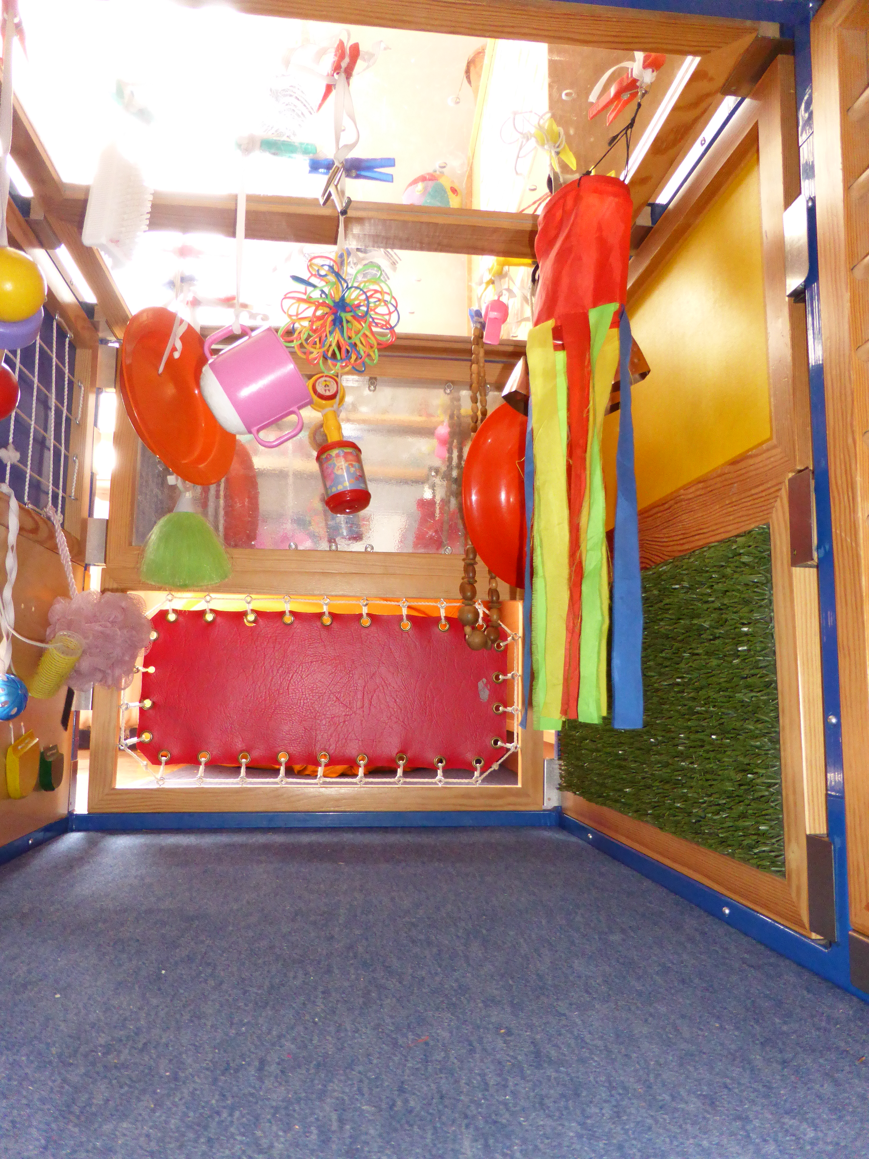 Little Room, entwickelt von Lilli Nielsen